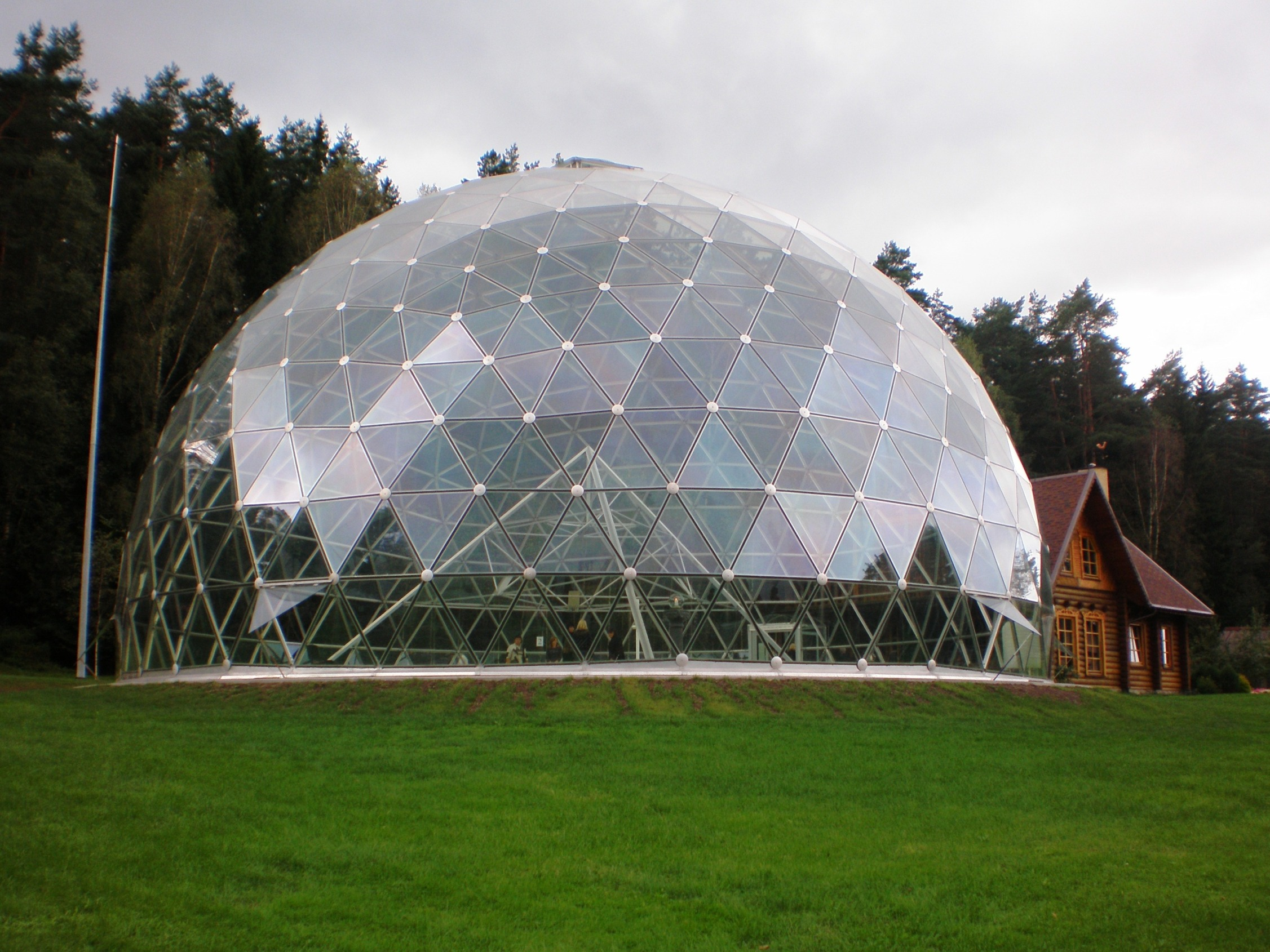 Česukų piramidė, Varėnos raj.